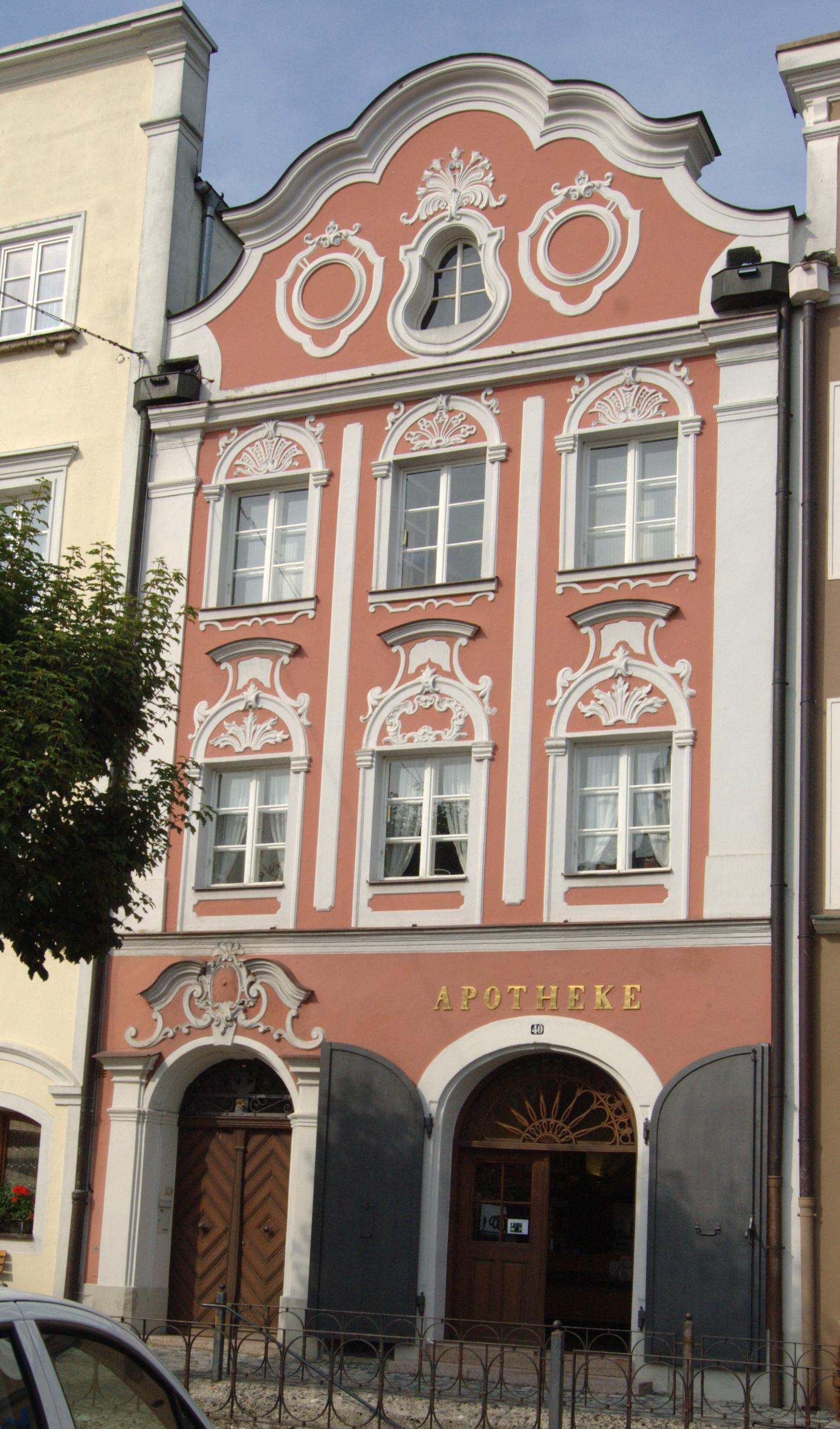 StadtapothekeThis is a photograph of an architectural monument.